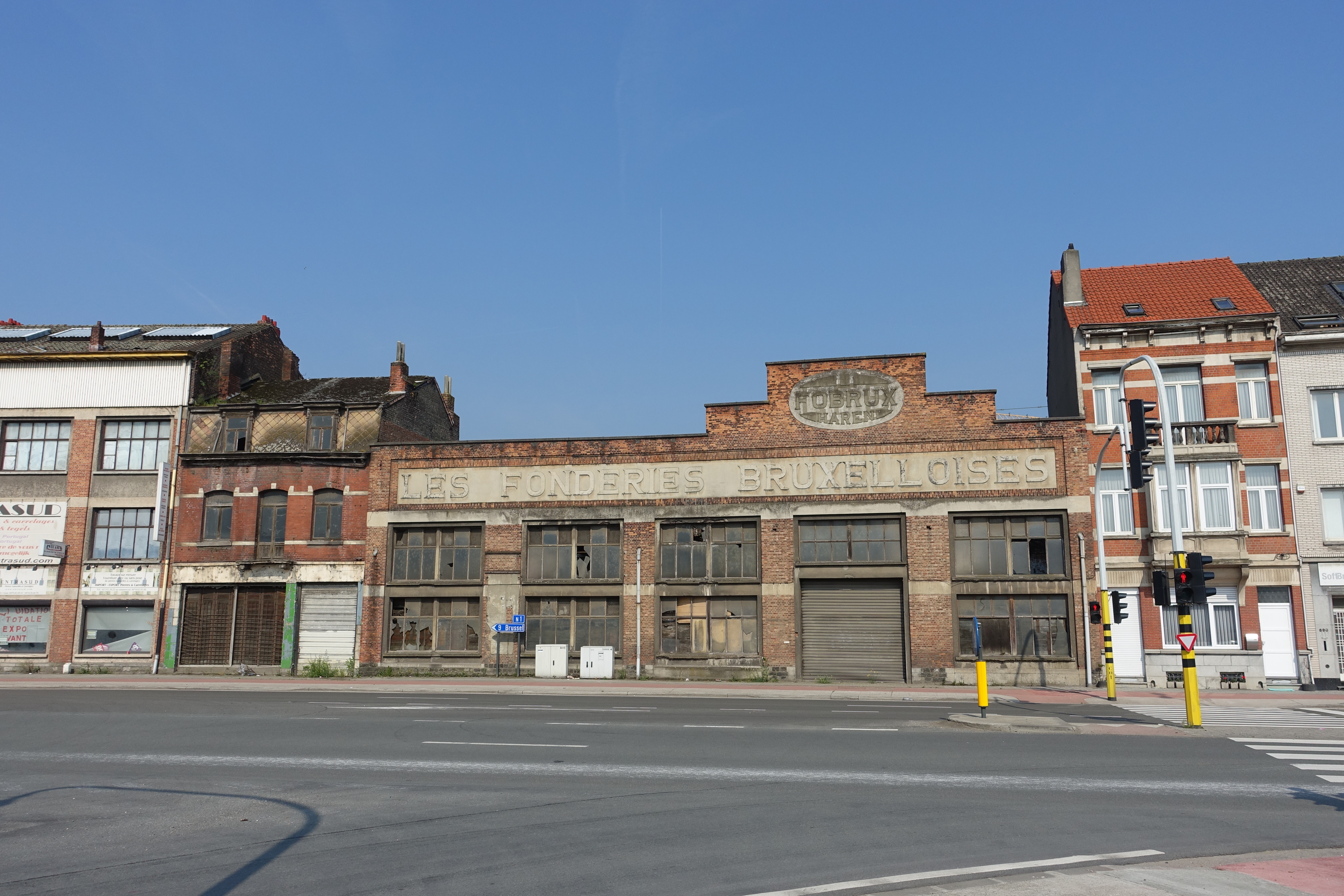 Schaarbeeklei in Vilvoorde bij de kruising met de Generaal Lemanlaan